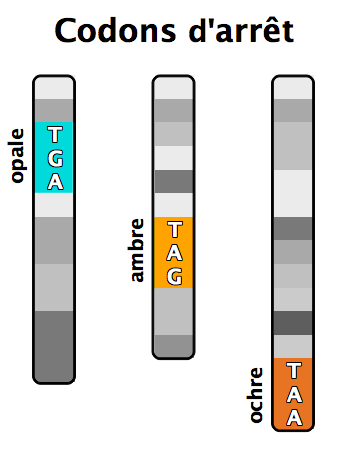 codon stop, codon de terminaison, arrêt, génétique, chromosone